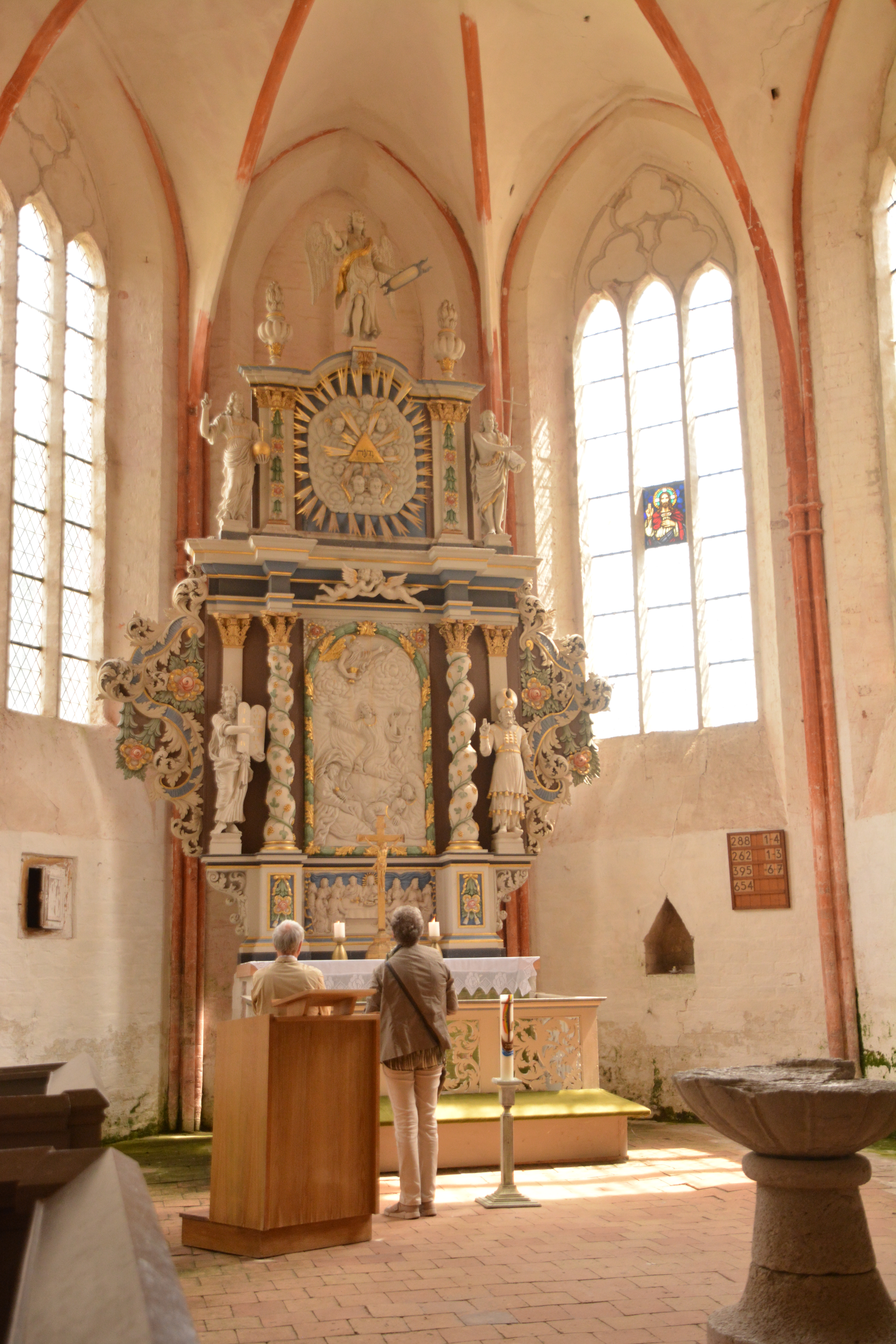 Dorfkirche Saal Innenansicht Altar